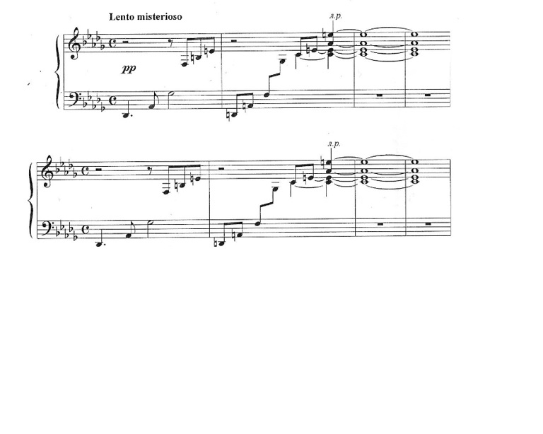 Третя п'єса фортепіанного циклу "Калейдоскоп настроїв"